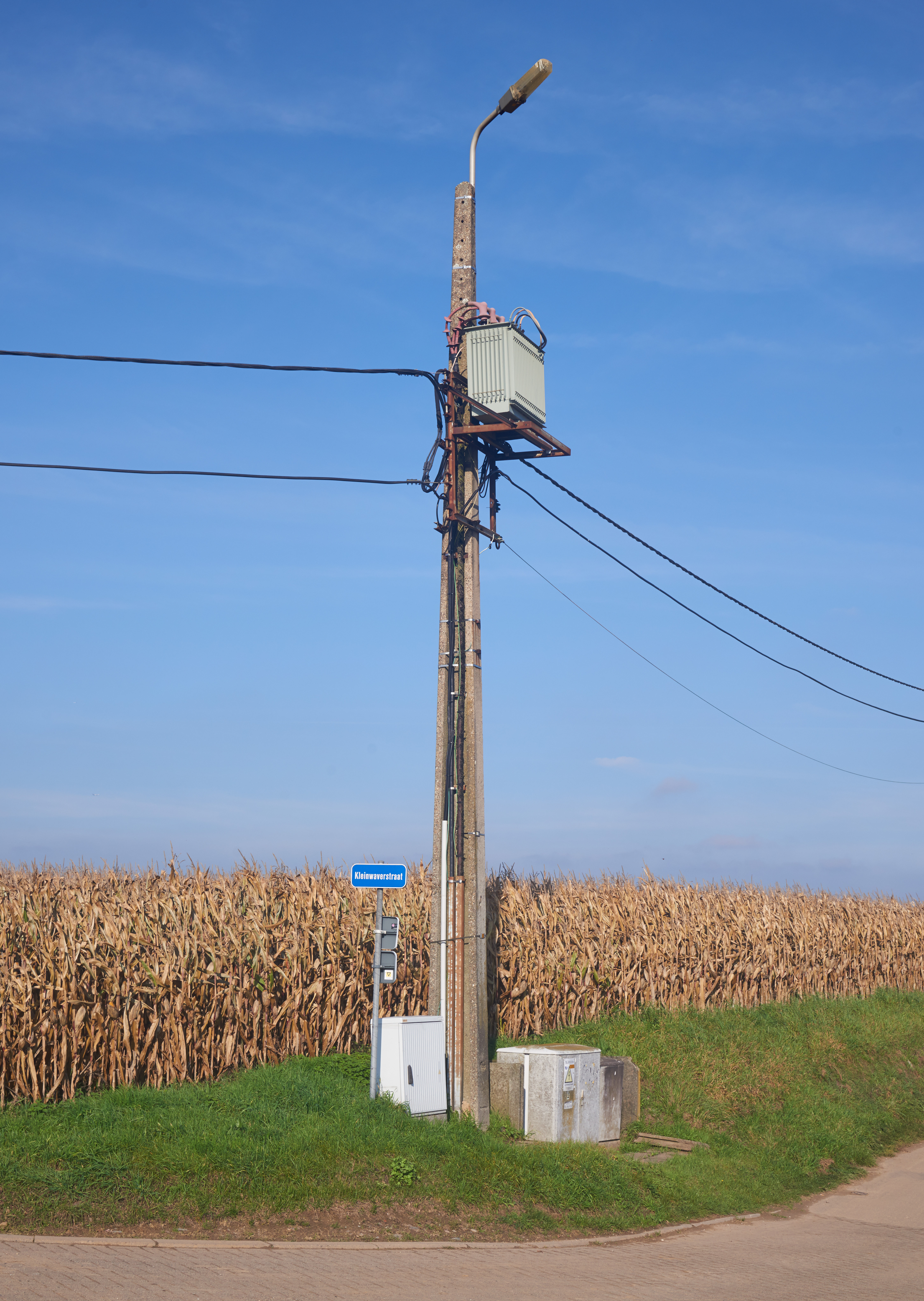 Transformator 11.000 Volt naar 400 Volt en schakelkasten (400 en 11.000 Volt) bij kruispunt Nijvelsebaan en Kleinwaverstraat in Huldenberg